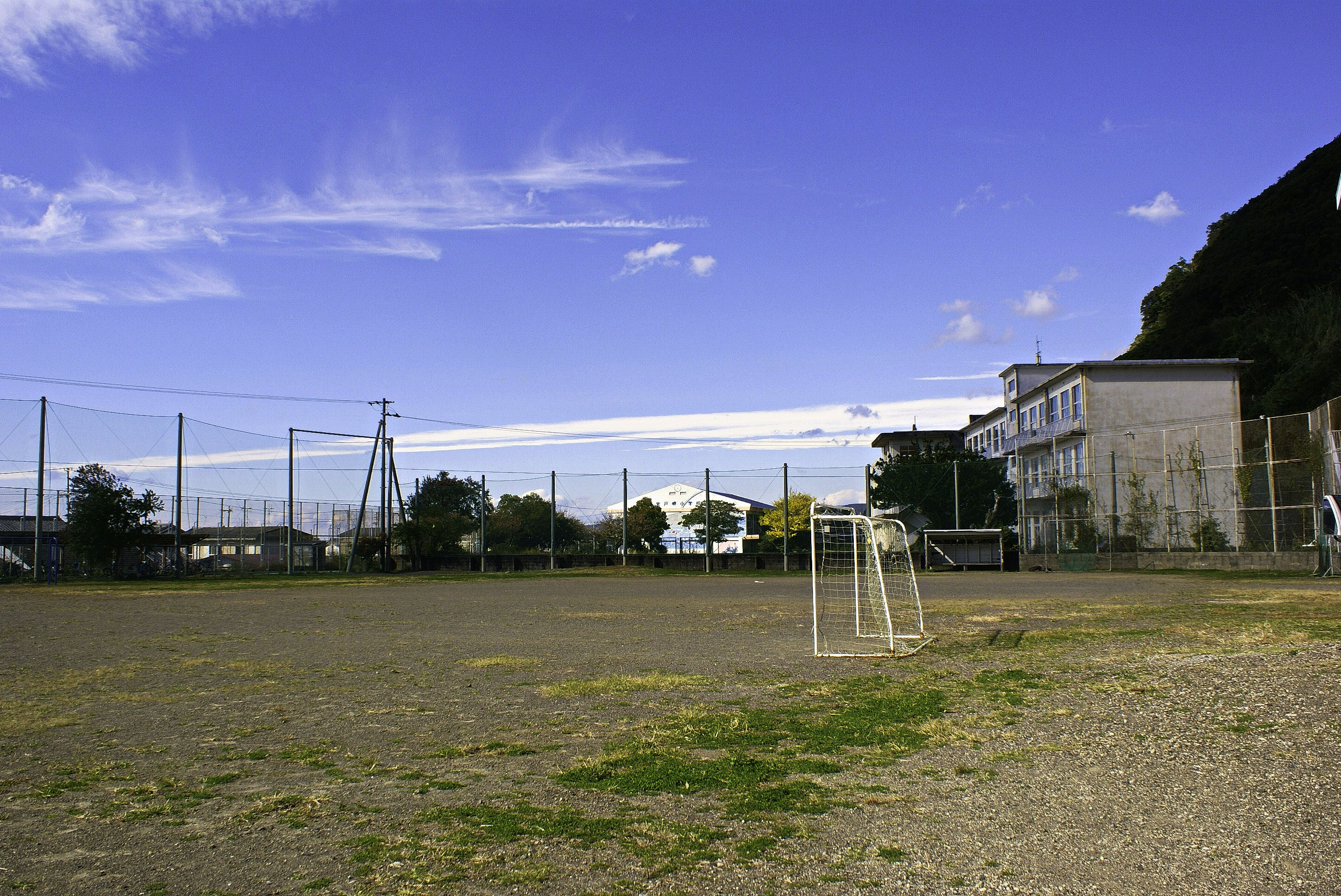 室戸市立室戸岬小学校運動場と旧室戸岬小学校校舎。 現在使用している校舎は室戸岬中学校(室戸中学校と統合)の校舎である。